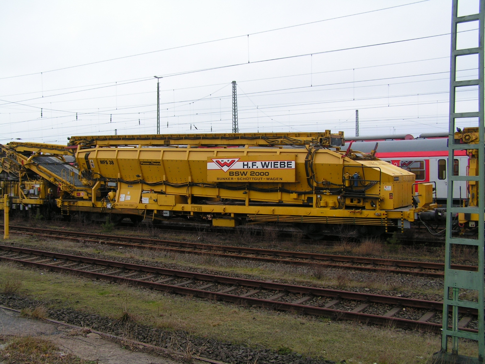 BSW 2000/MFS 38 des Gleisbauunternehmens "Wiebe".